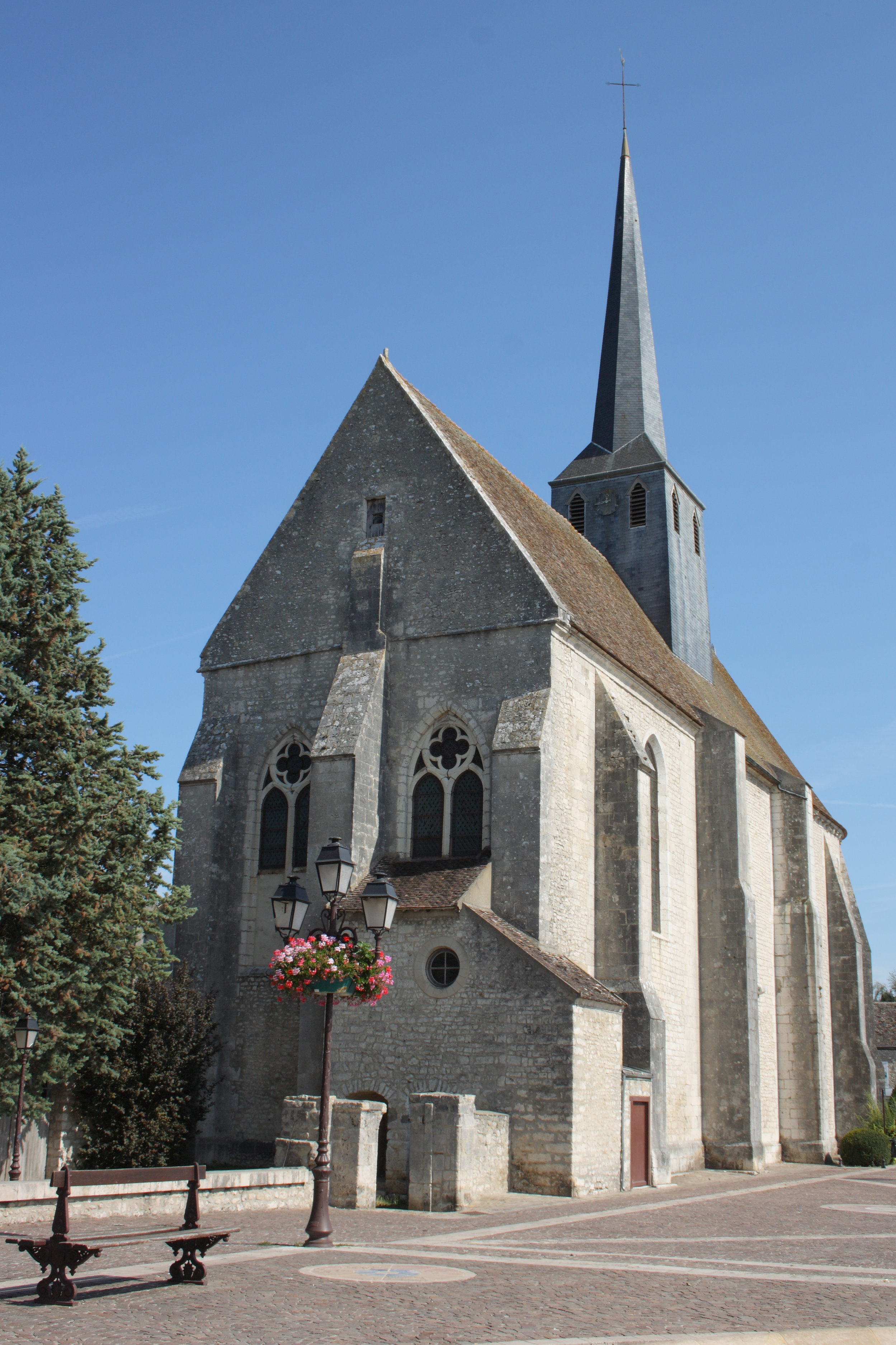 Katholische Pfarrkirche Saint-Clair-Saint-Léger in Souppes-sur-Loing im Département Seine-et-Marne in der Region Île-de-France (Frankreich), Ansicht von Westen